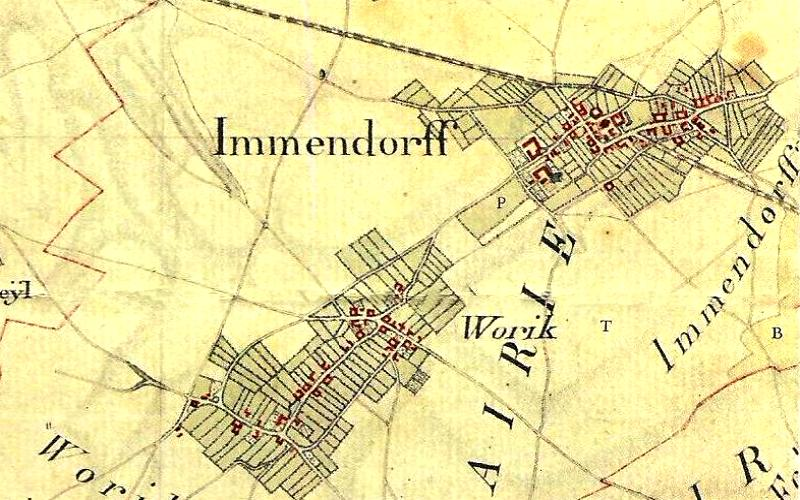 Kartenaufnahme der Rheinlande 1803-1820